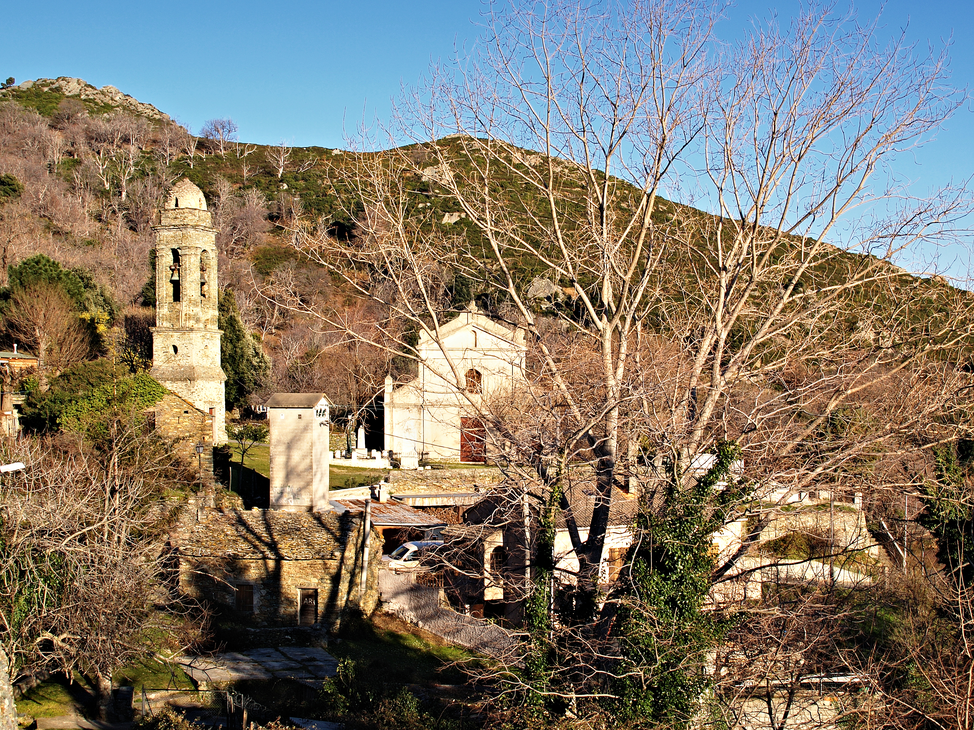 Scolca (Corse) - Eglise San Mamiliano